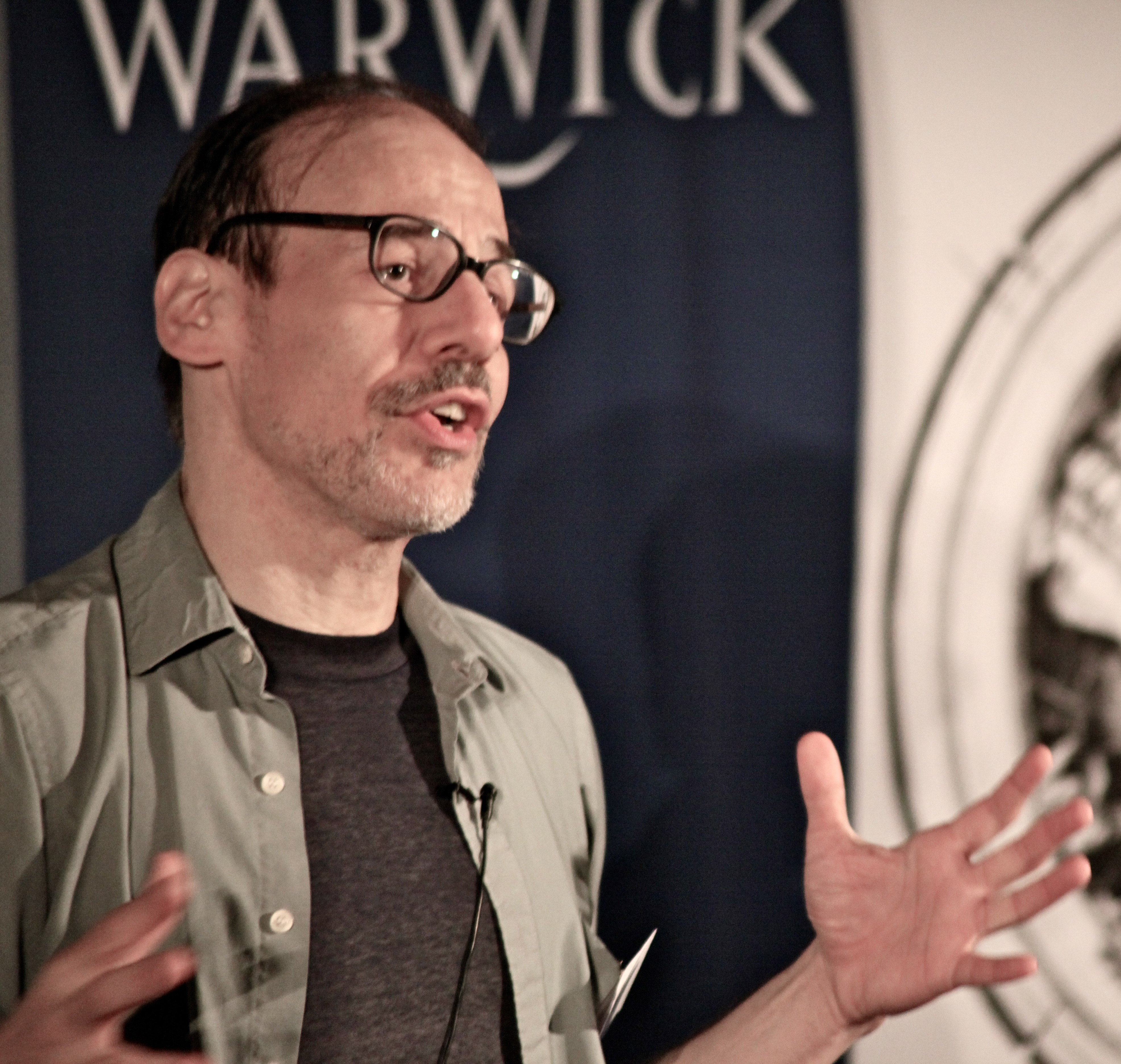 Steve Fuller (sociologist) at VirtualFutures